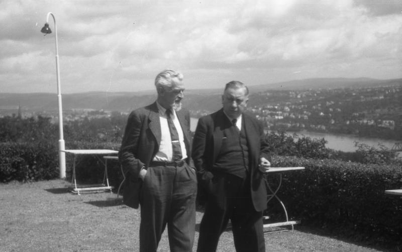 Ministerpräsidenten-Konferenz der Länder der 3 Westzonen Deutschlands auf dem Berghotel Rittersturz in Koblenz (v.l.n.r.: Dr. Hermann Lüdemann, Josef Müller) 8.-10.7.1948